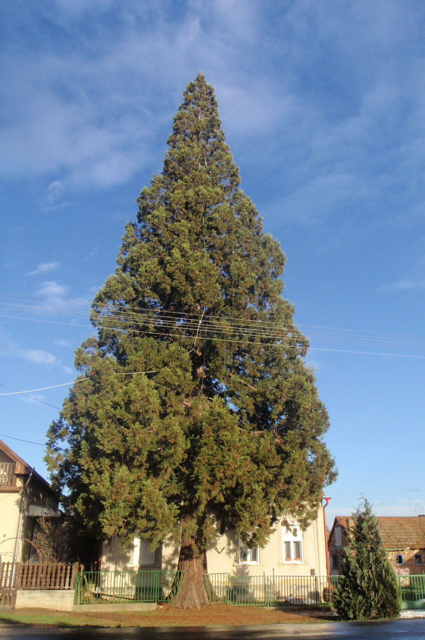 Riesenmammutbaum in Nova, komitat Zala, Ungarn